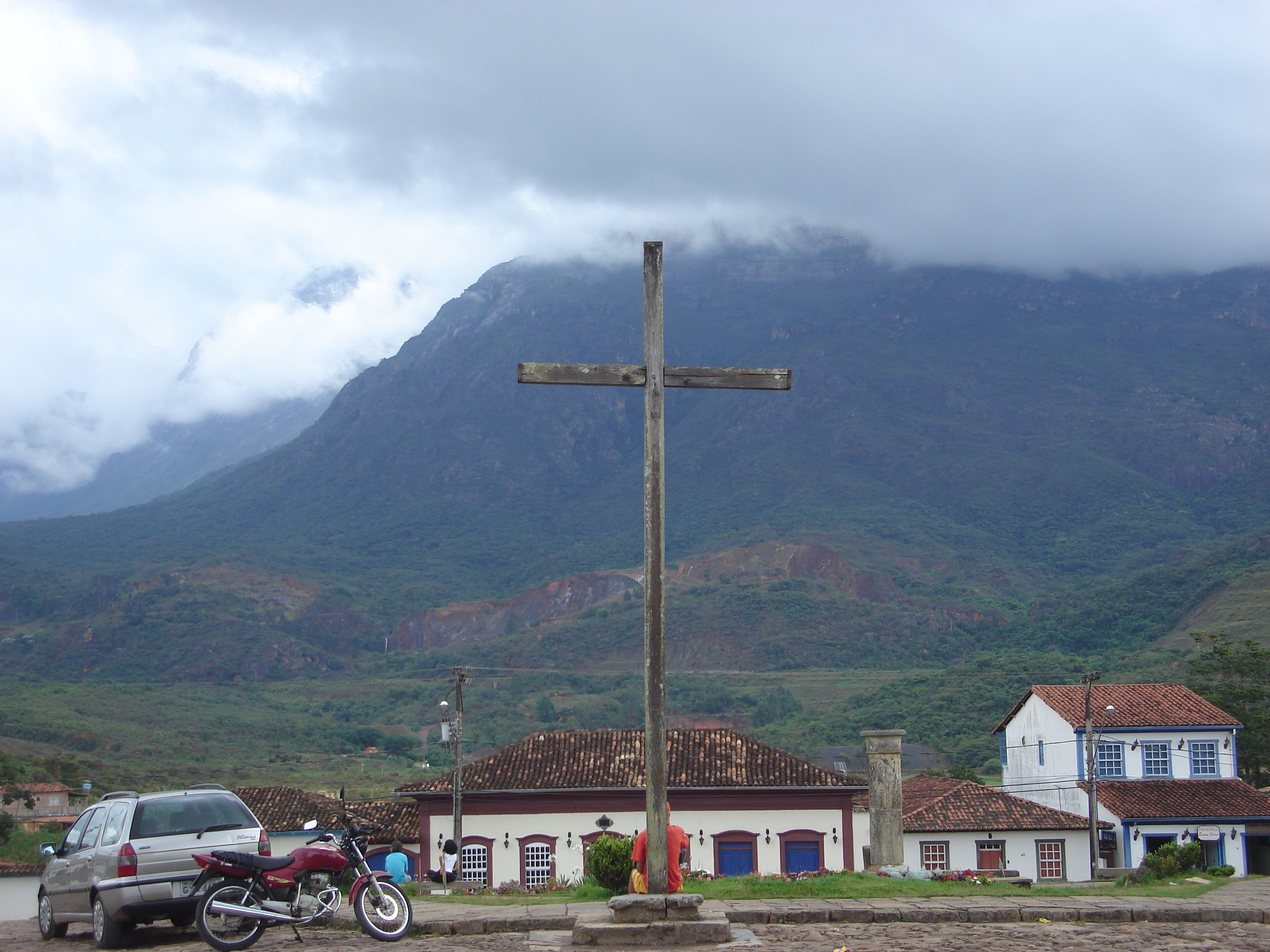 Praça da Matriz em Catas Altas, Minas Gerais, Brazil. Ao fundo, Serra do Caraça. Historical center of Catas Altas, Minas Gerais, Brazil. Caraça Hill in the background.